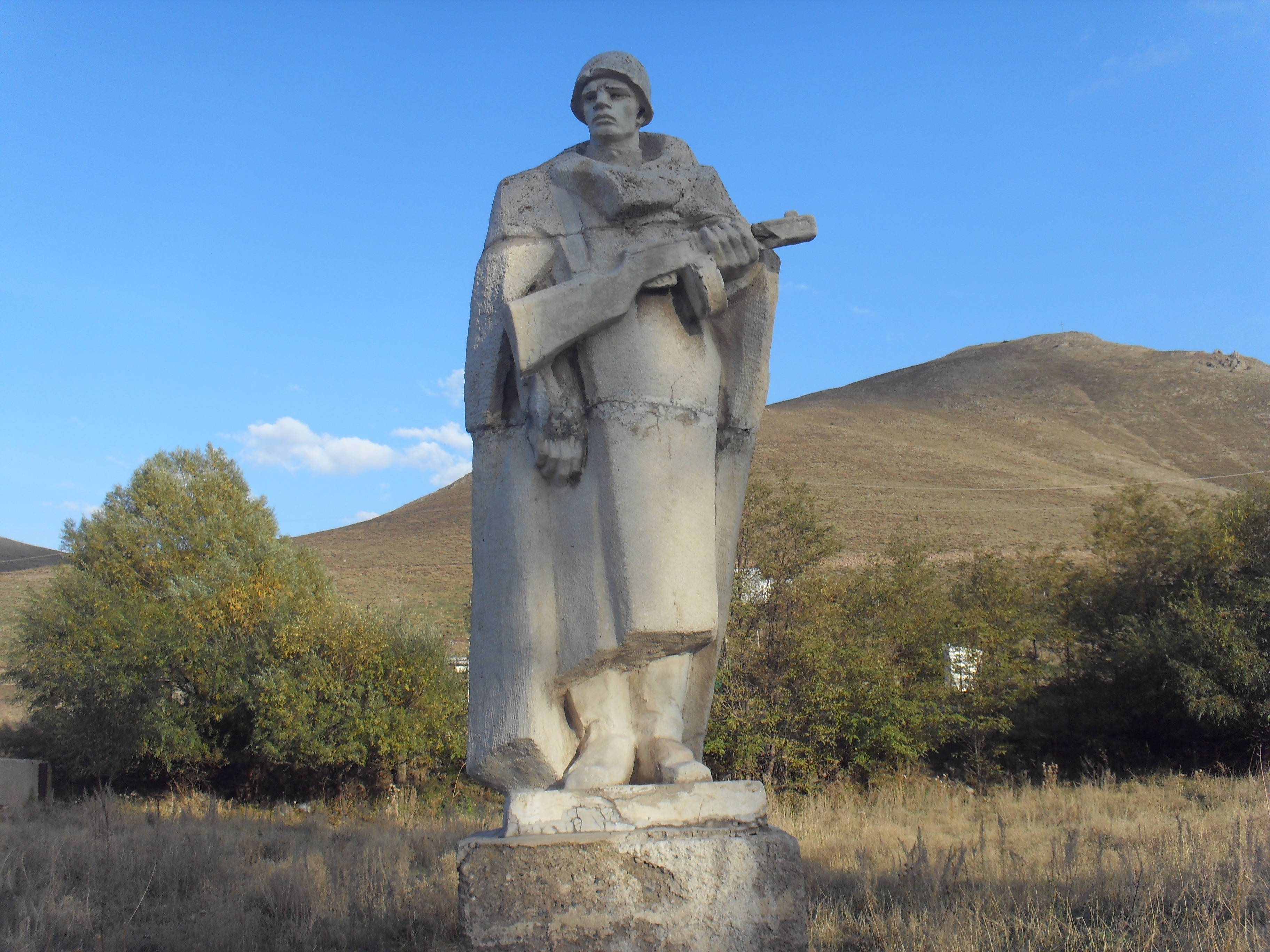 Զինվորի արձան (2-րդ Համաշխարհային պատերազմի հուշակոթող) 94/7